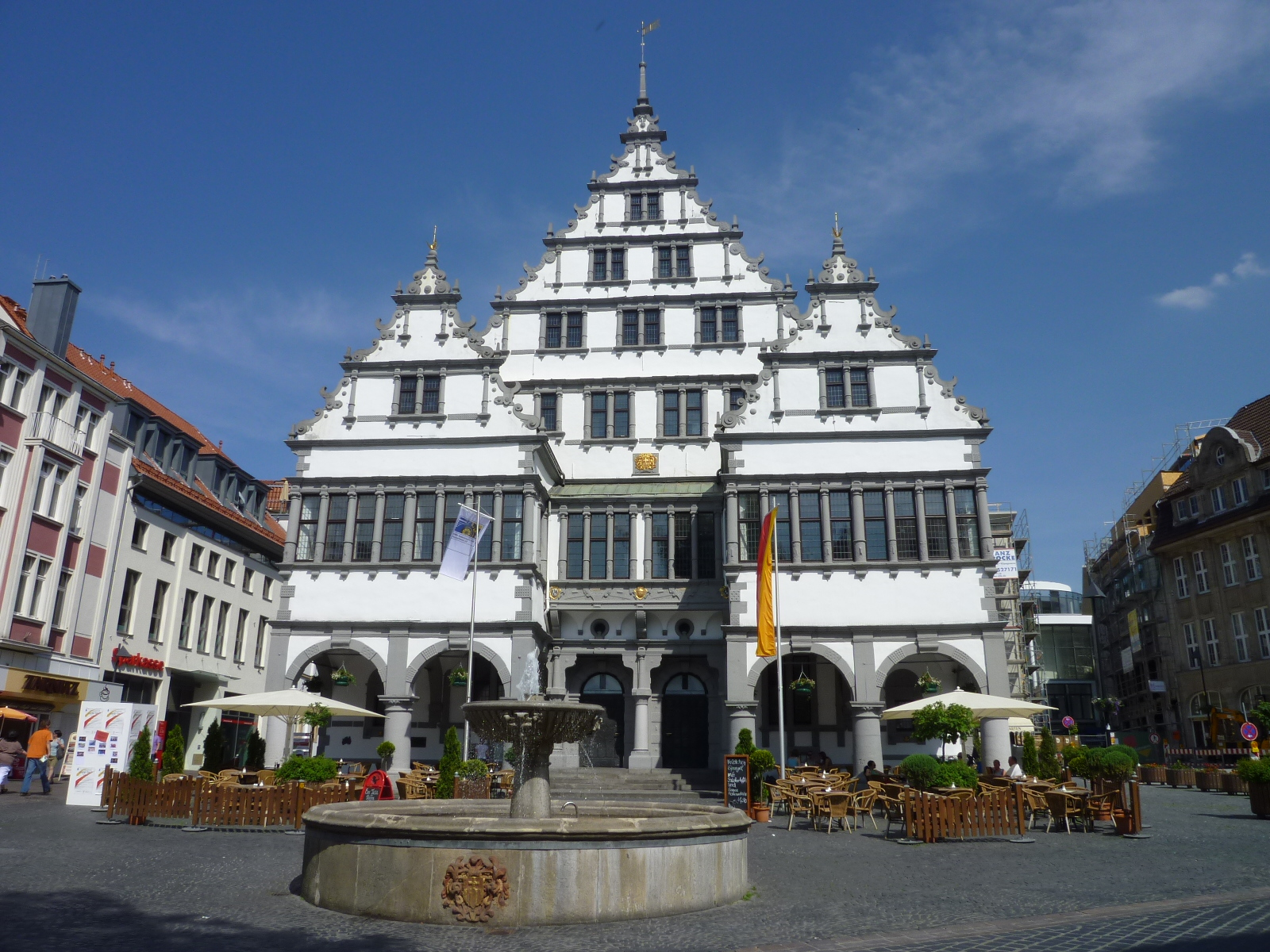 Das Rathaus in Paderborn am Rathausplatz 1, erbaut in den Jahren 1613–1620. This is a photograph of an architectural monument.